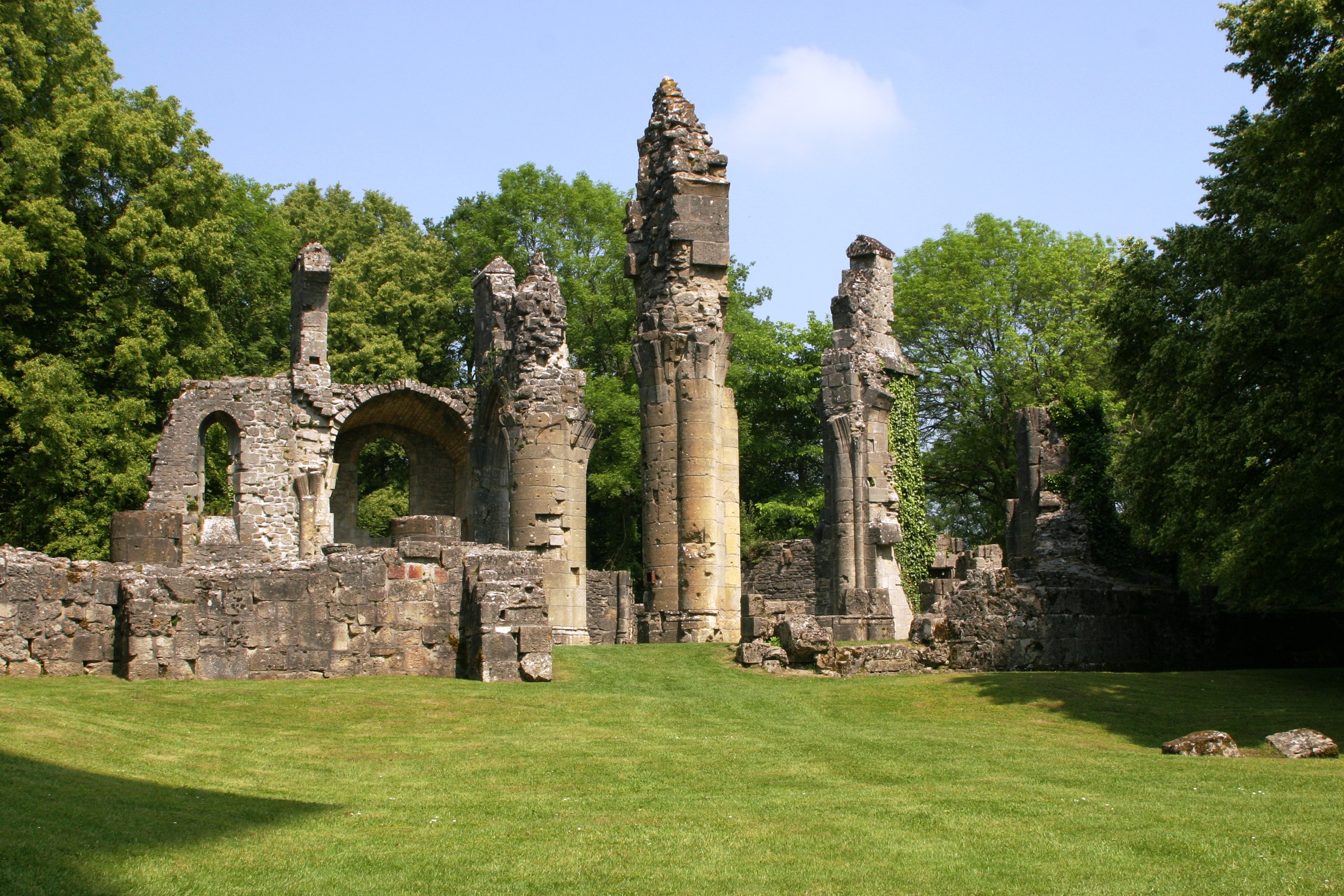 D'Reschter vun der Collégiale St. Germain.